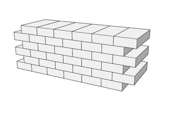 Sillares montados a tizón.